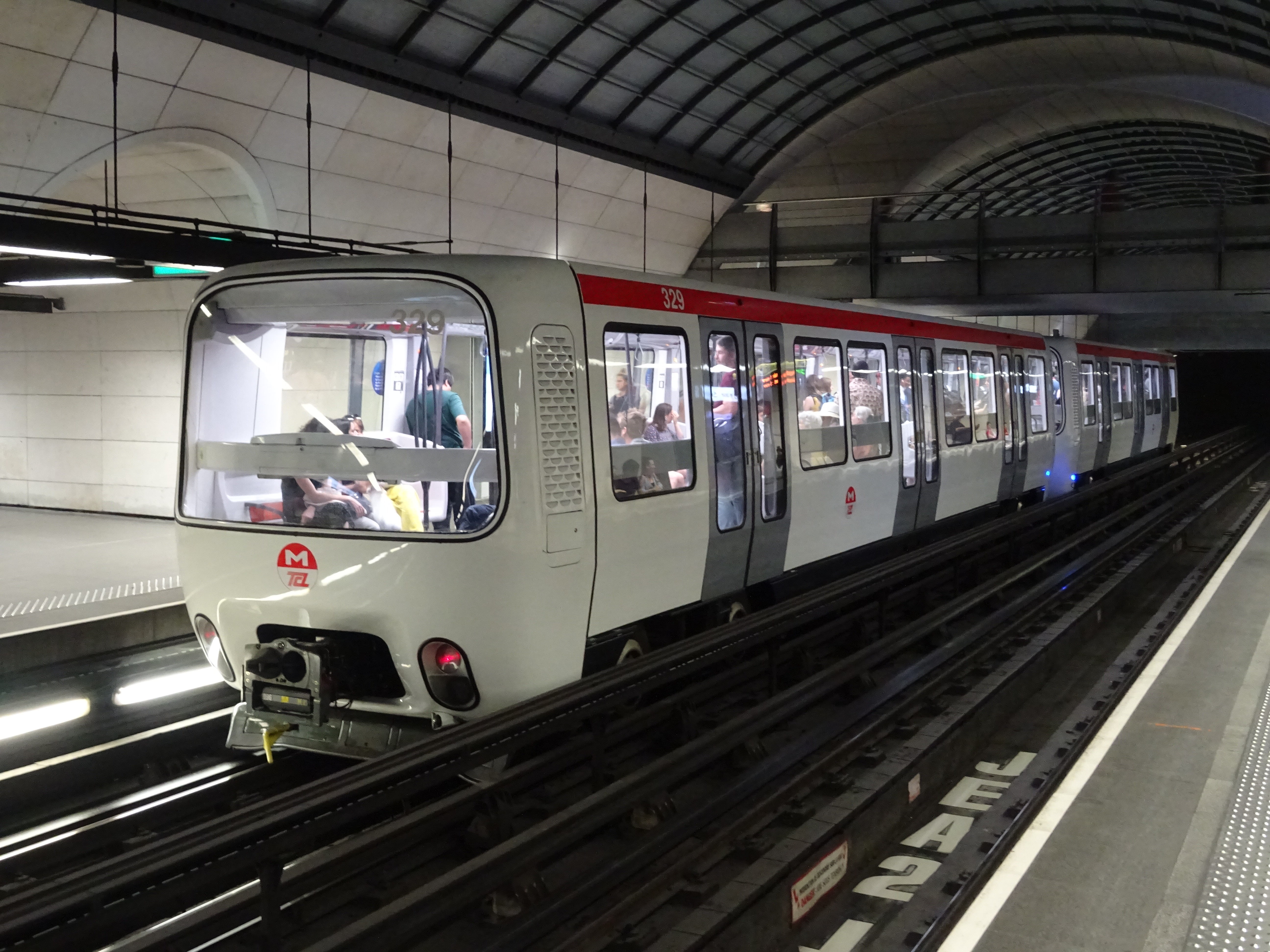 Zoom sur un MPL85 à la station Vieux-Lyon - Cathédrale Saint-Jean sur la ligne D du métro lyonnais.